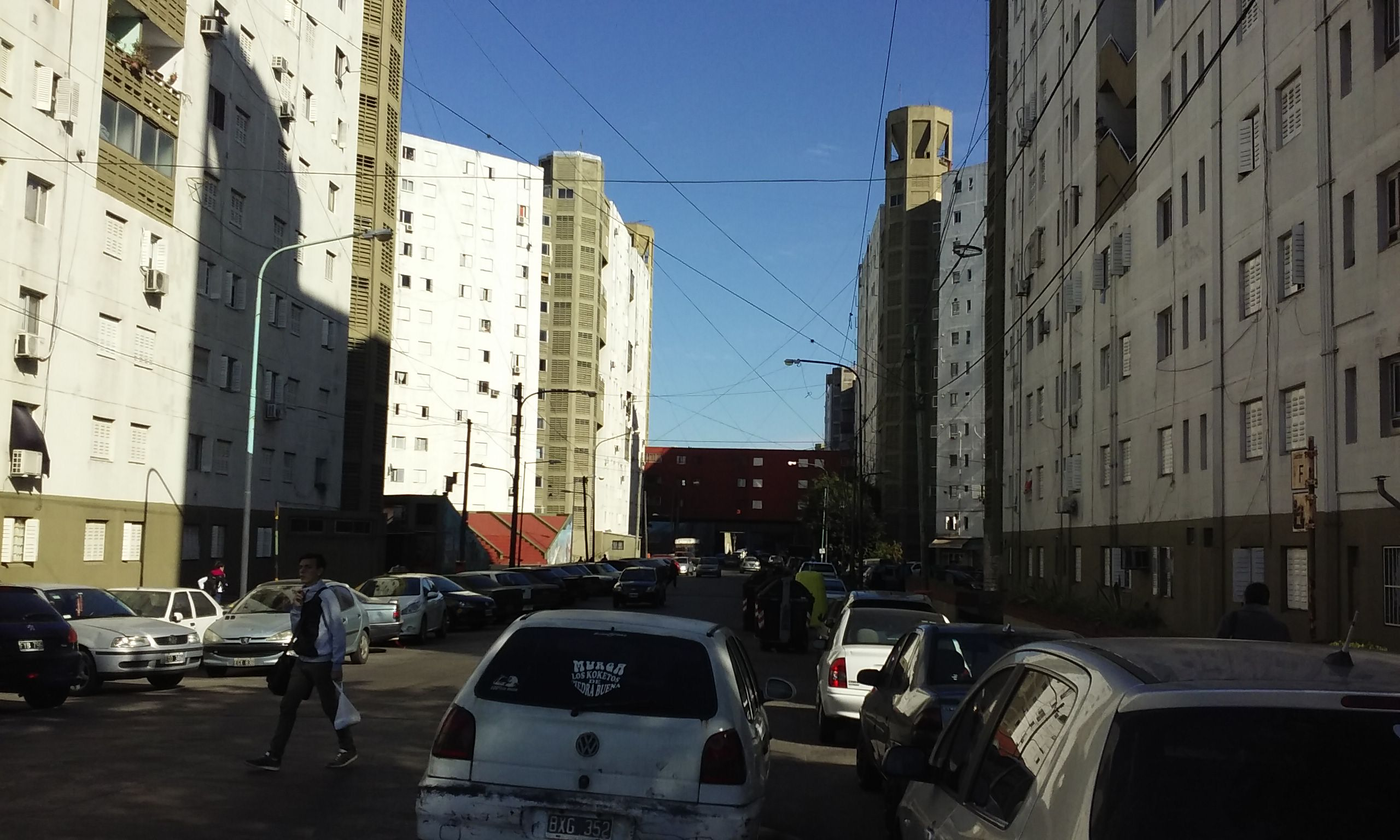 Conjunto Comandante Piedrabuena en el barrio de Mataderos, ciudad de Buenos Aires. Desde la calle 2 de Abril y Avenida Piedrabuena.